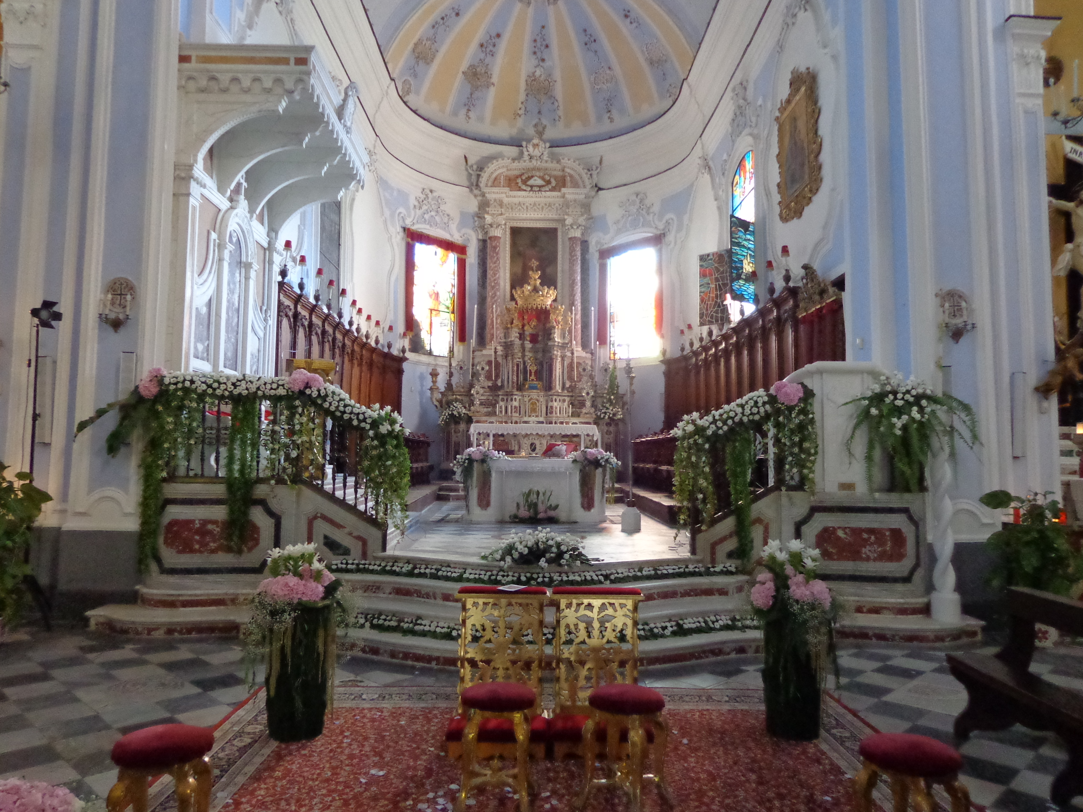 Panoramica abside